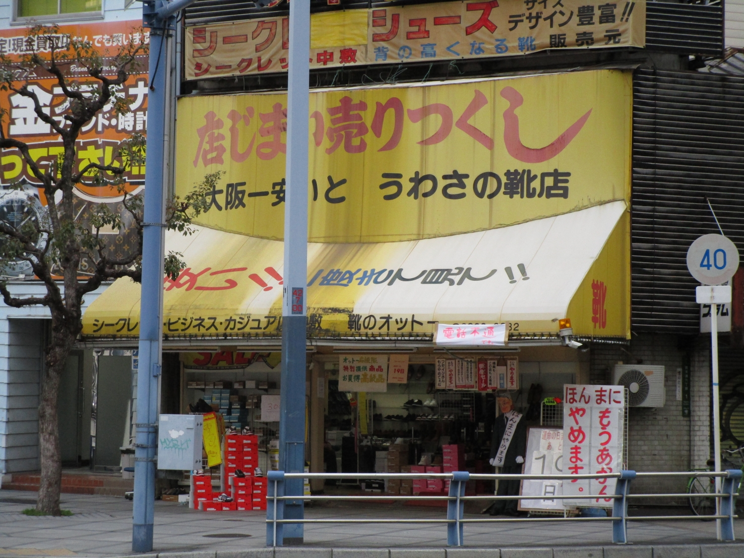 靴のオットー 閉店前の外観